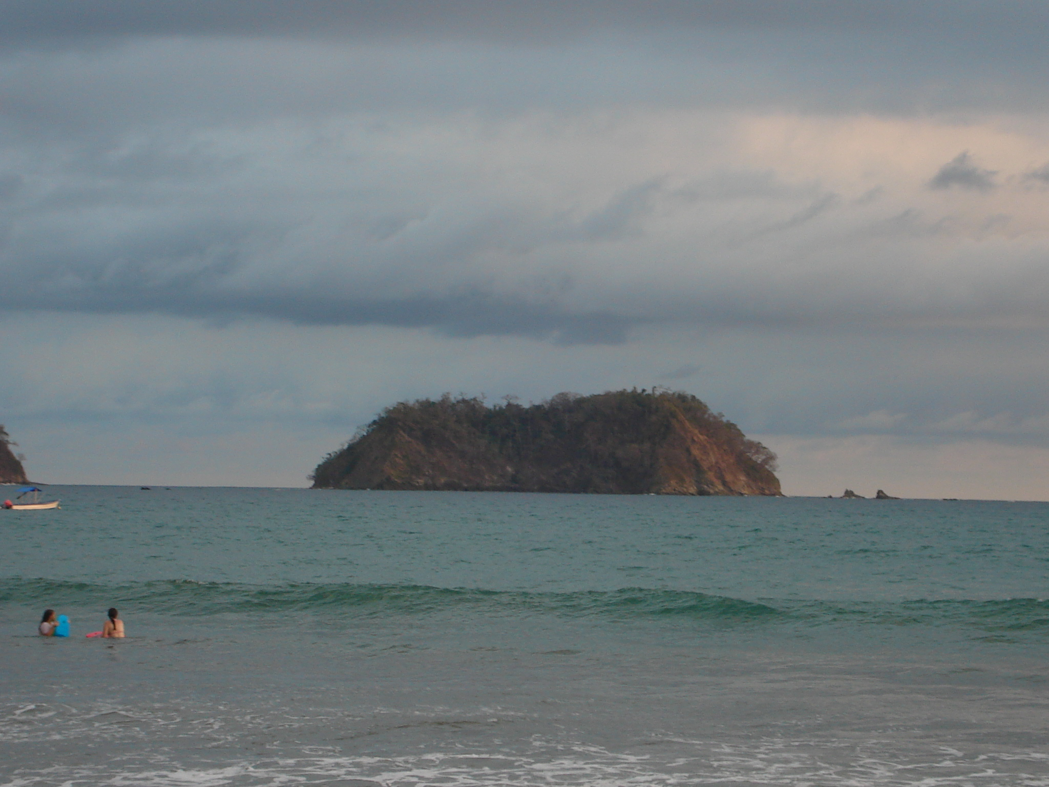 Playa Sámara, Costa Rica